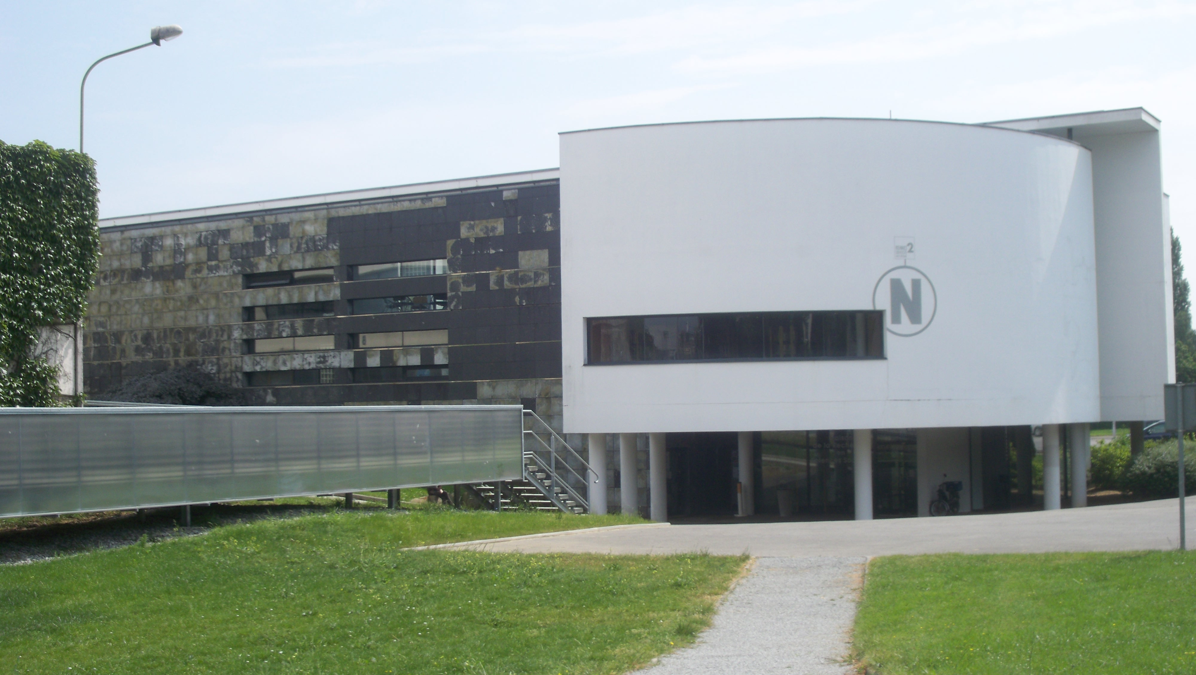 Le bâtiment N abrite certains des laboratoires de recherche de l'UFR Sciences Sociales.